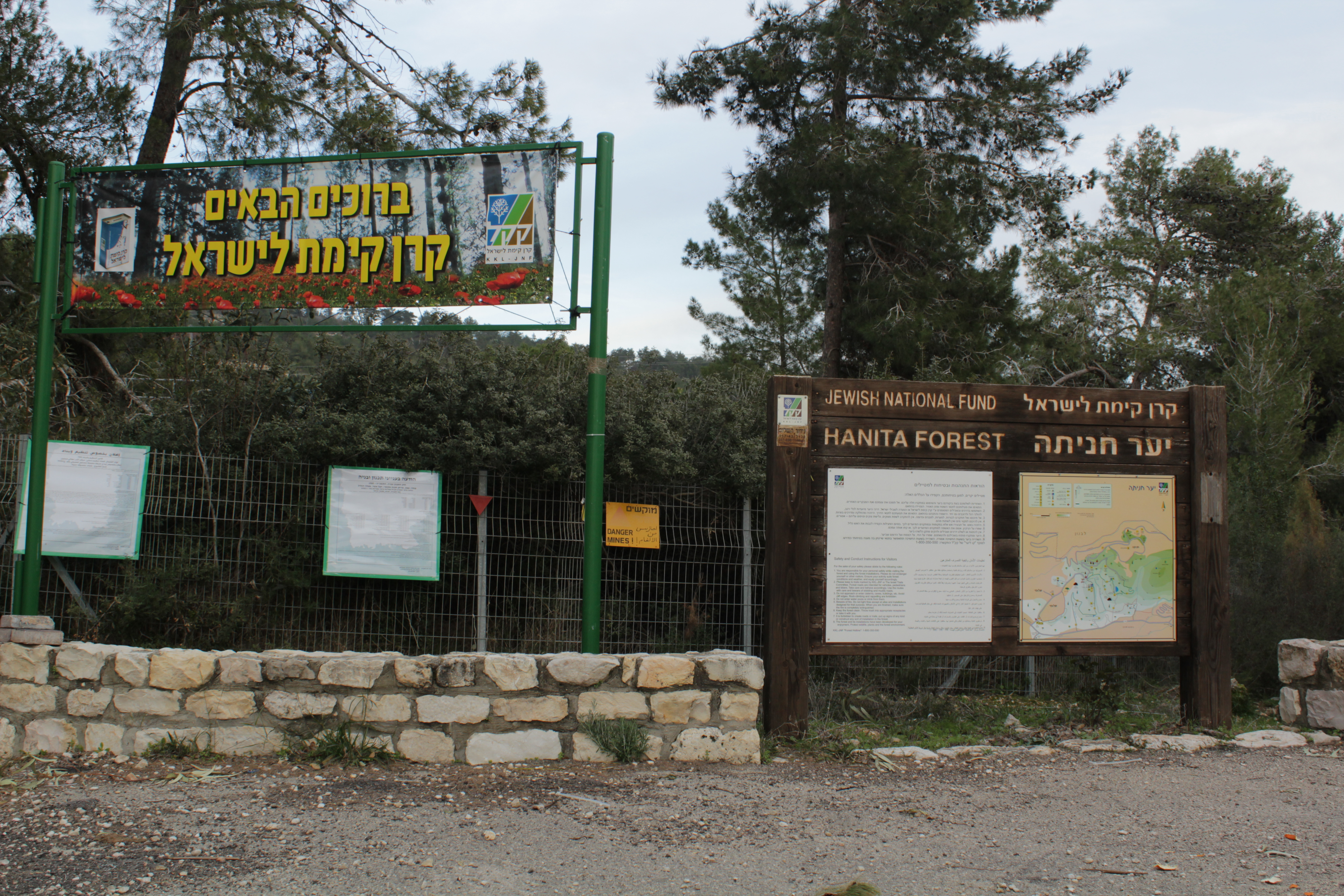 שלט בכניסה ליער חניתה